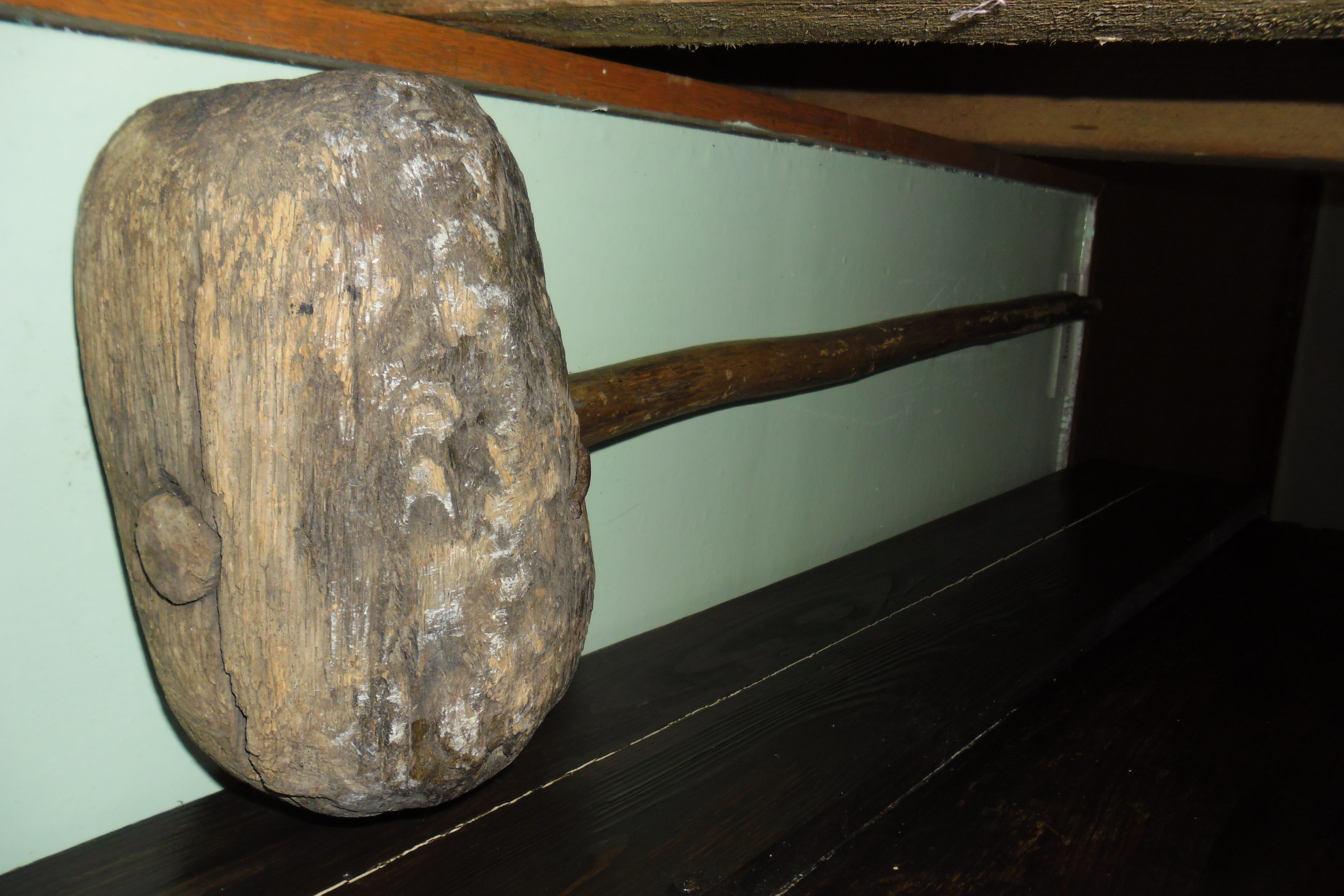 Фото